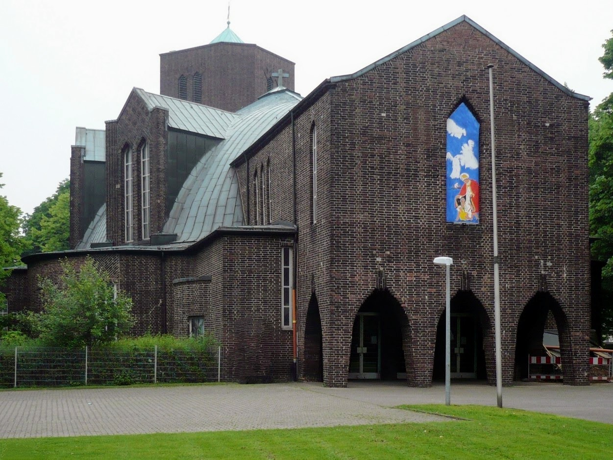 Heilige-Schutzengel-Kirche Kirche in Essen-Frillendorf